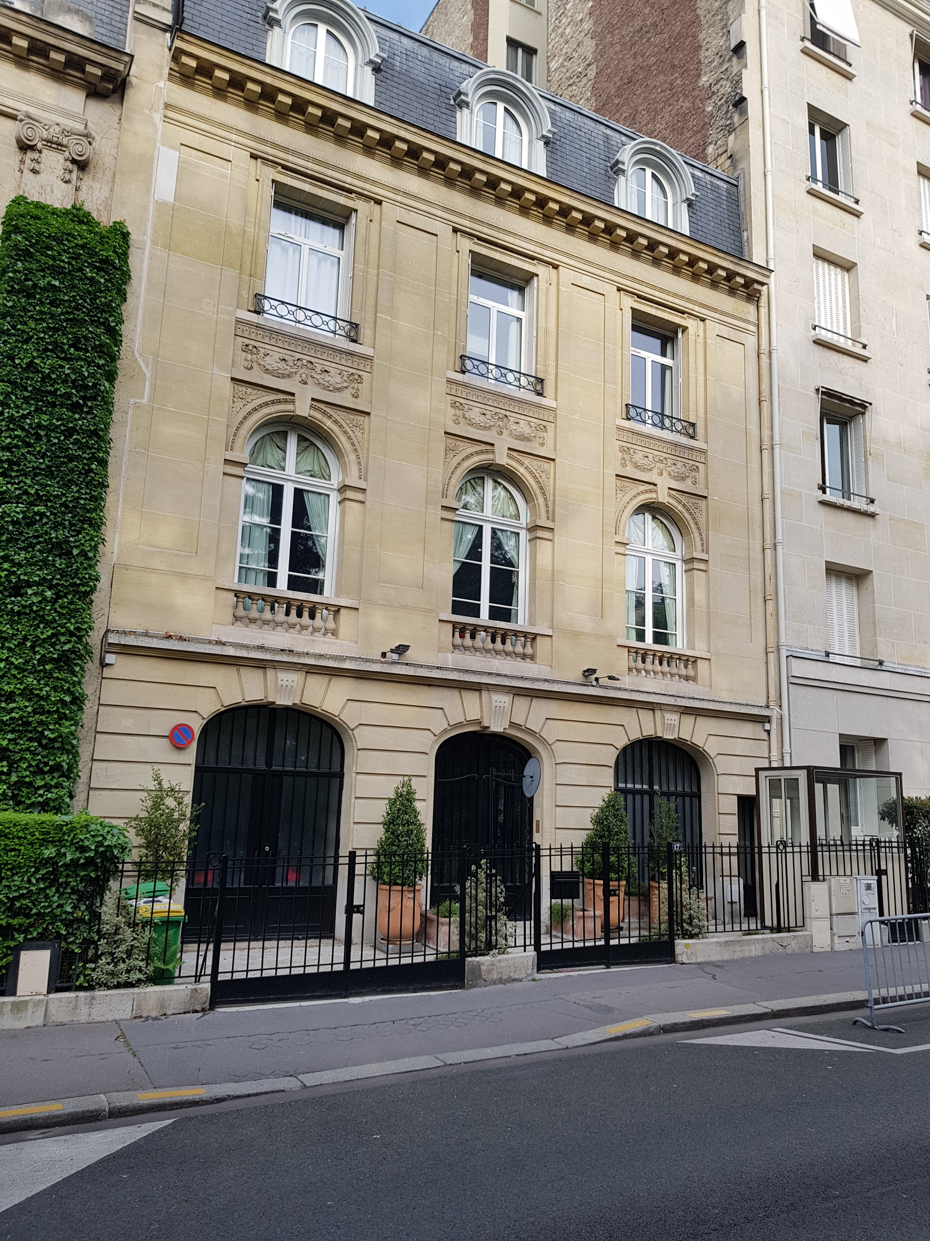 17 avenue Léopold-II, Paris 16e.